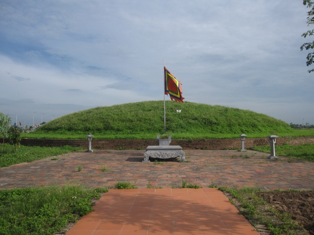 Lăng Trần Thánh Tông ở Long Hưng, Thái Bình (nay là xã Tiến Đức, huyện Hưng Hà, tỉnh Thái Bình)